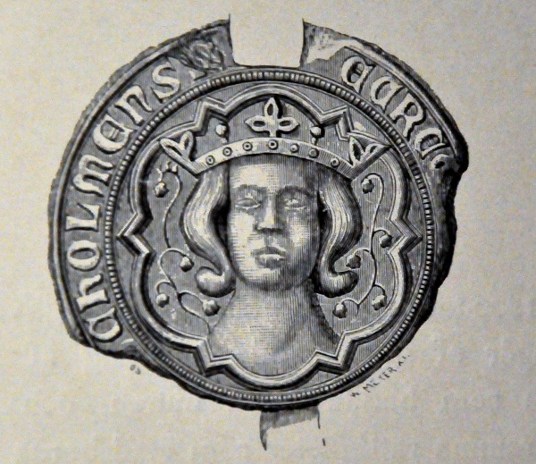 Äldsta bevarade avdrag av S:t Erikssigillet.